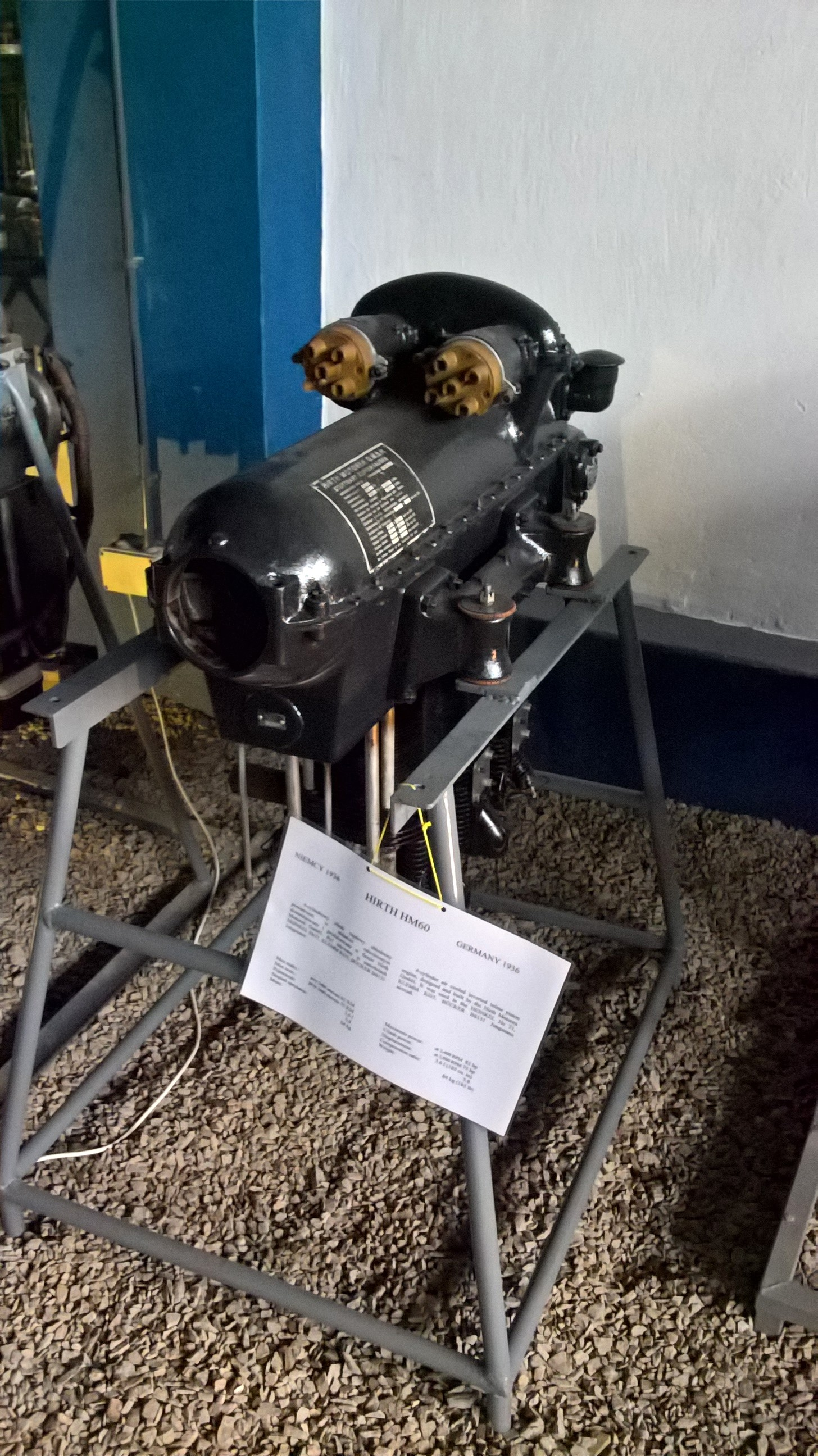 Niemiecki 4-cylindrowy silnik rzędowy Hirth HM-60 z 1936 r. ze zbiorów Muzeum Lotnictwa Polskiego w Krakowie.